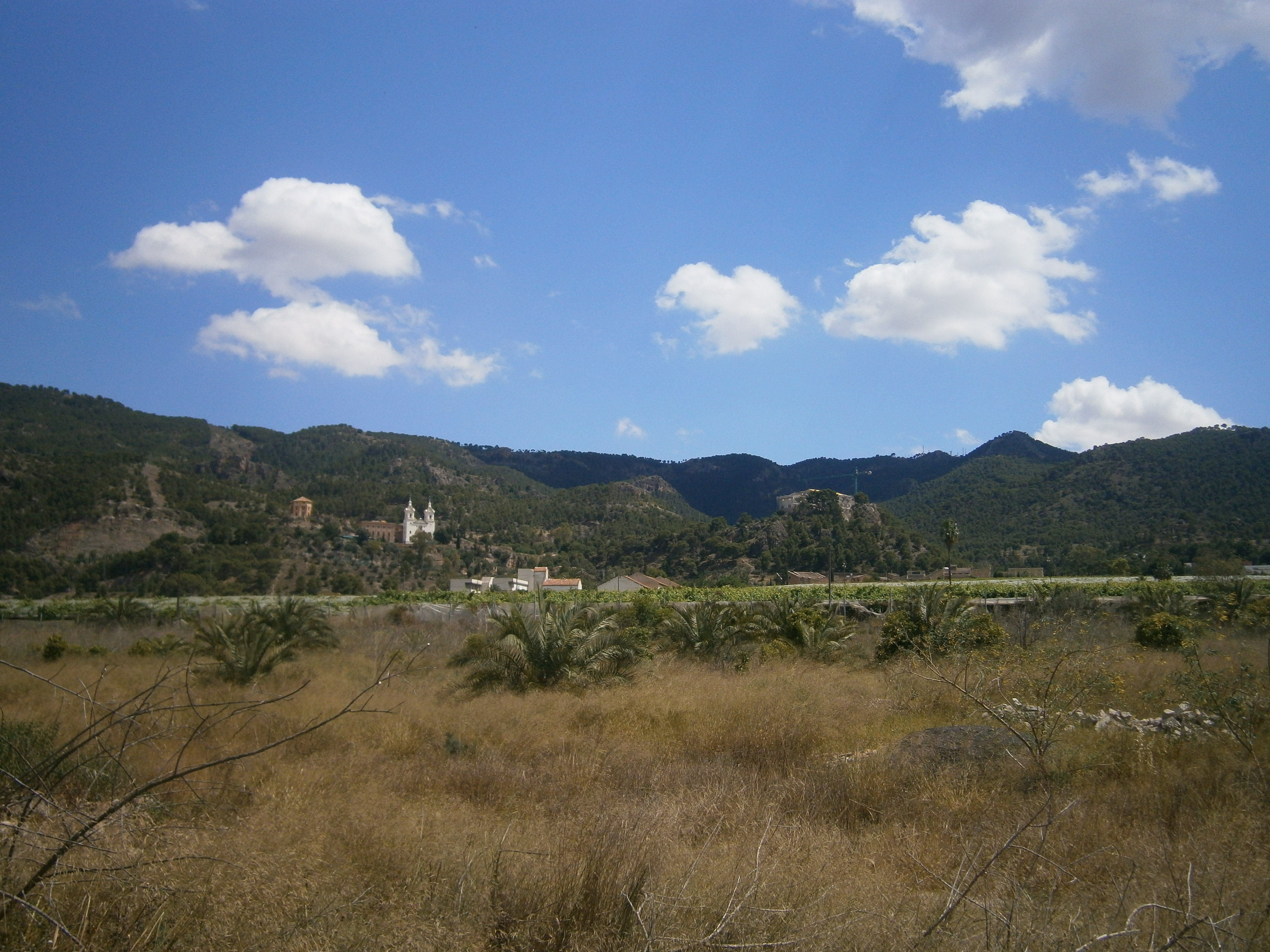 Paraje entre Algezares y Santo Ángel que pretenden urbanizar destruyendo el paisaje